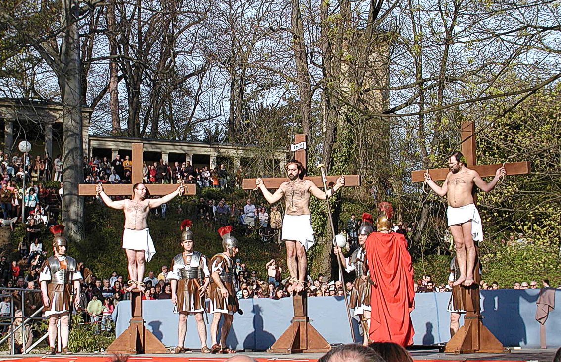 Die Prozession in Stuttgart Bad Cannstatt Schlussbild